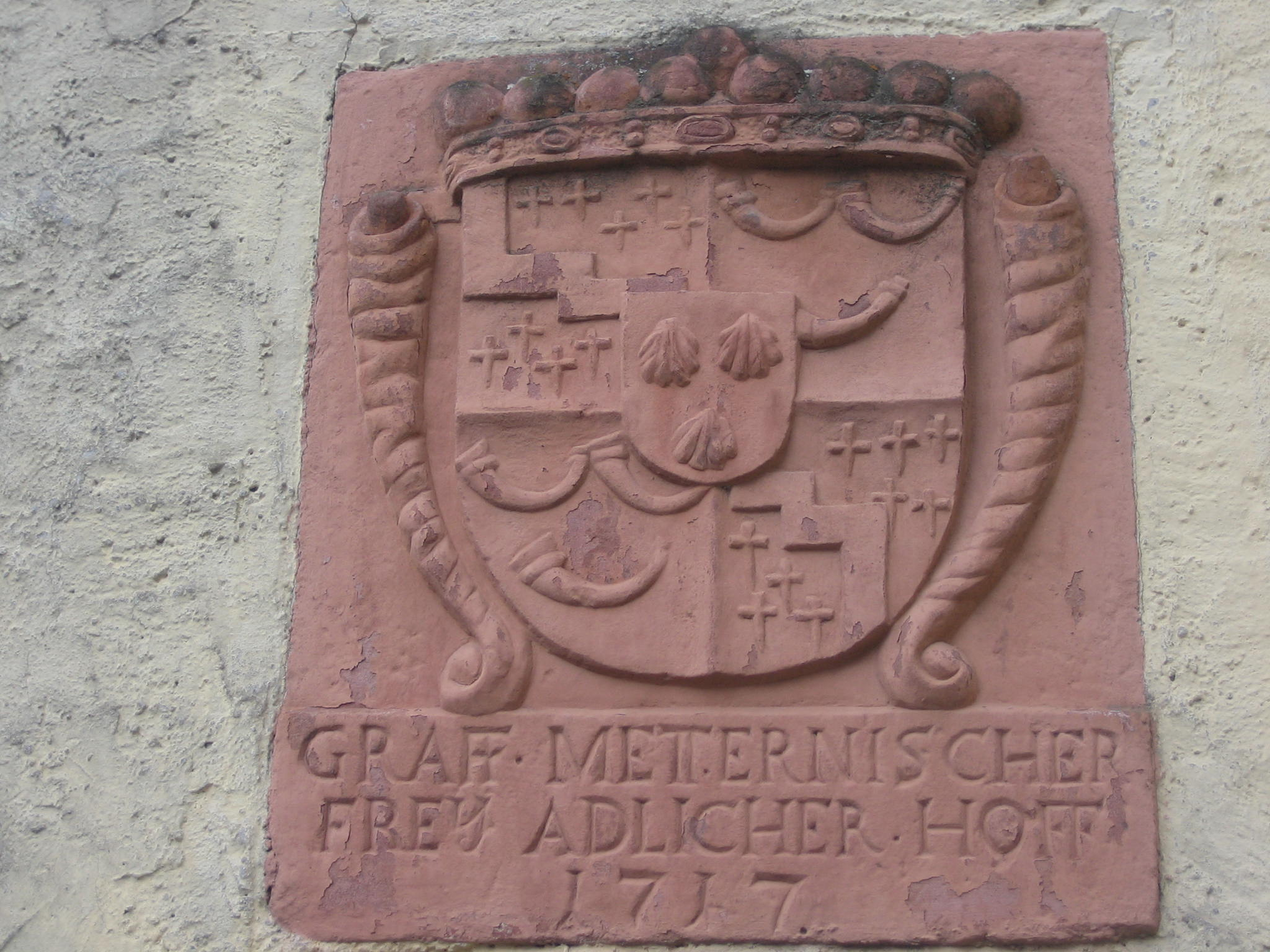 Metternich'scher Hof von (1717), aus dem Besitz des Johann Philipp Graf Cratz zu Scharfenstein und seiner Frau Maria von Metternich. 1877 erwarb Pfarrer Johannes Zaun das Areal um das St. Valentinushaus in Nachfolge des mittelalterlichen St. Valentinus-Hospitals zu gründen.